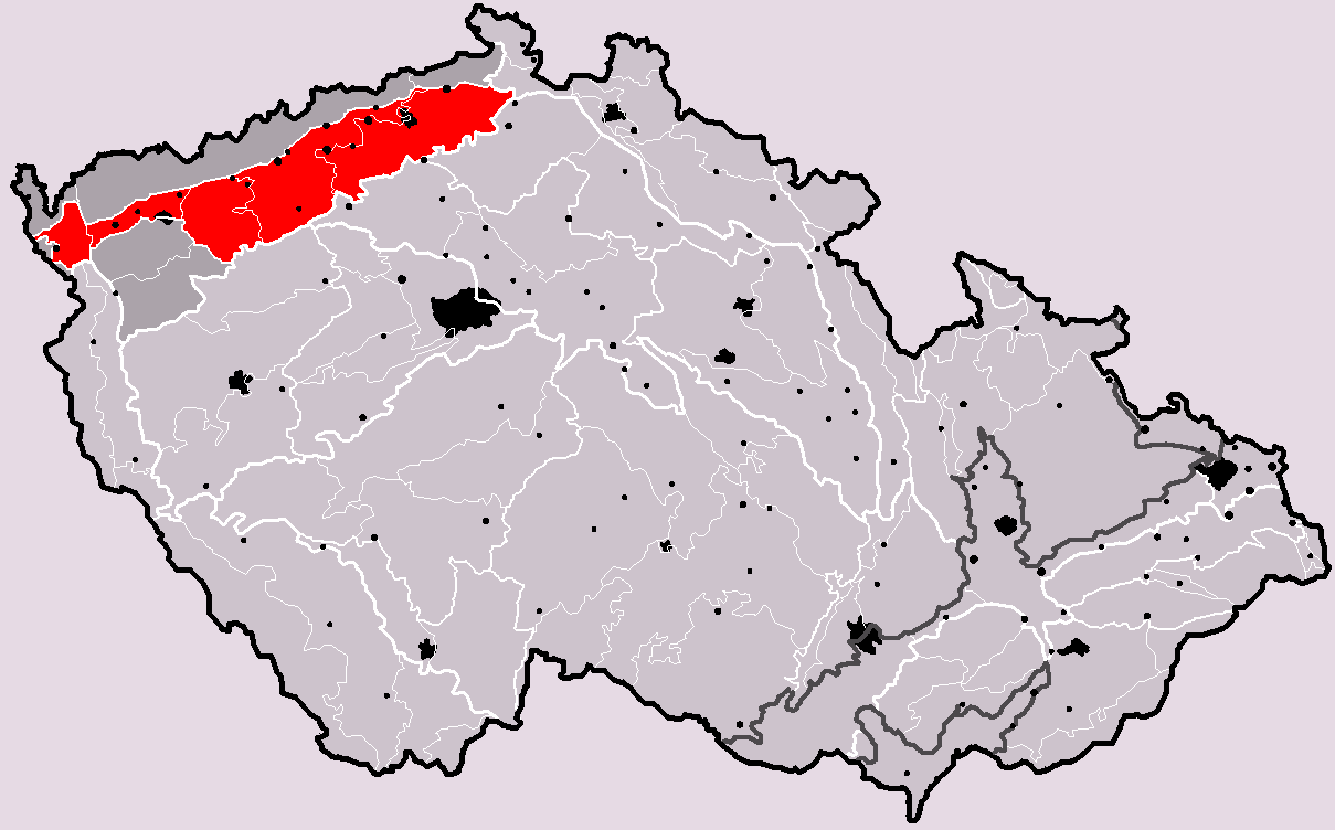 Poloha geomorfologické oblast (podsoustavy) Podkrušnohorská oblast v rámci České republiky. Hercynský systém Hercynská pohoří I Česká vysočina I3 (III) Krušnohorská subprovincie I3B (IIIB) Podkrušnohorská oblast